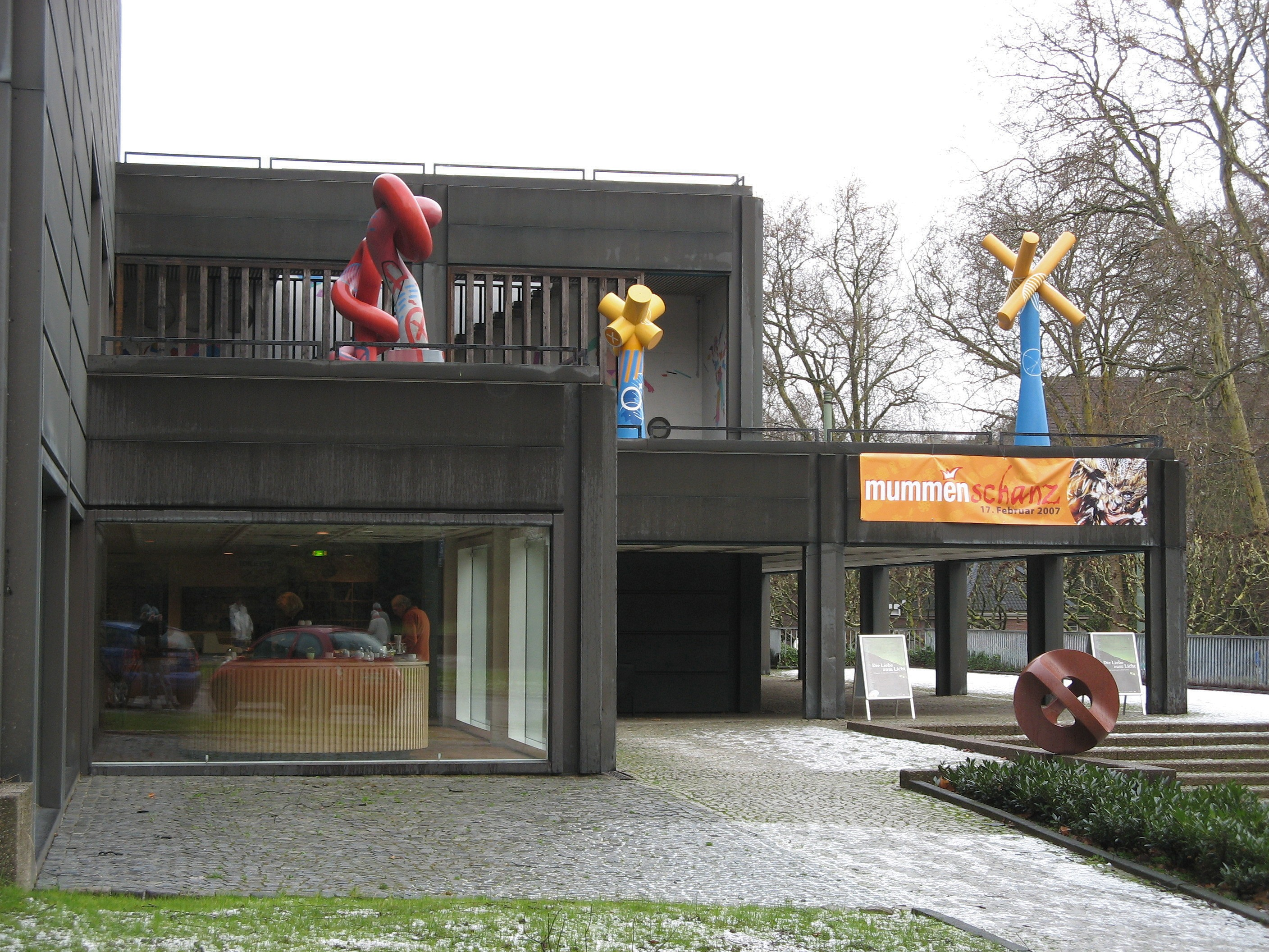 Kunstmuseum Bochum (mit rechts: Skulptur von Max Bill). Die Sammlungsschwerpunkte liegen in zeitgenössischer, ost- und mitteleuropäischer Kunst. Der Eigenbesitz umfaßt ca. 4000 Bilder, in wechselnden Ausstellungen werden Kunstwerke auch aus fremden Beständen als auch eigene Objekte gezeigt. Museum of Arts. The collection of about 4,000 paintings focuses on contemporary paintings from central and eastern Europe. The museum's regularly changing exhibitions also feature works on loan from other collections.